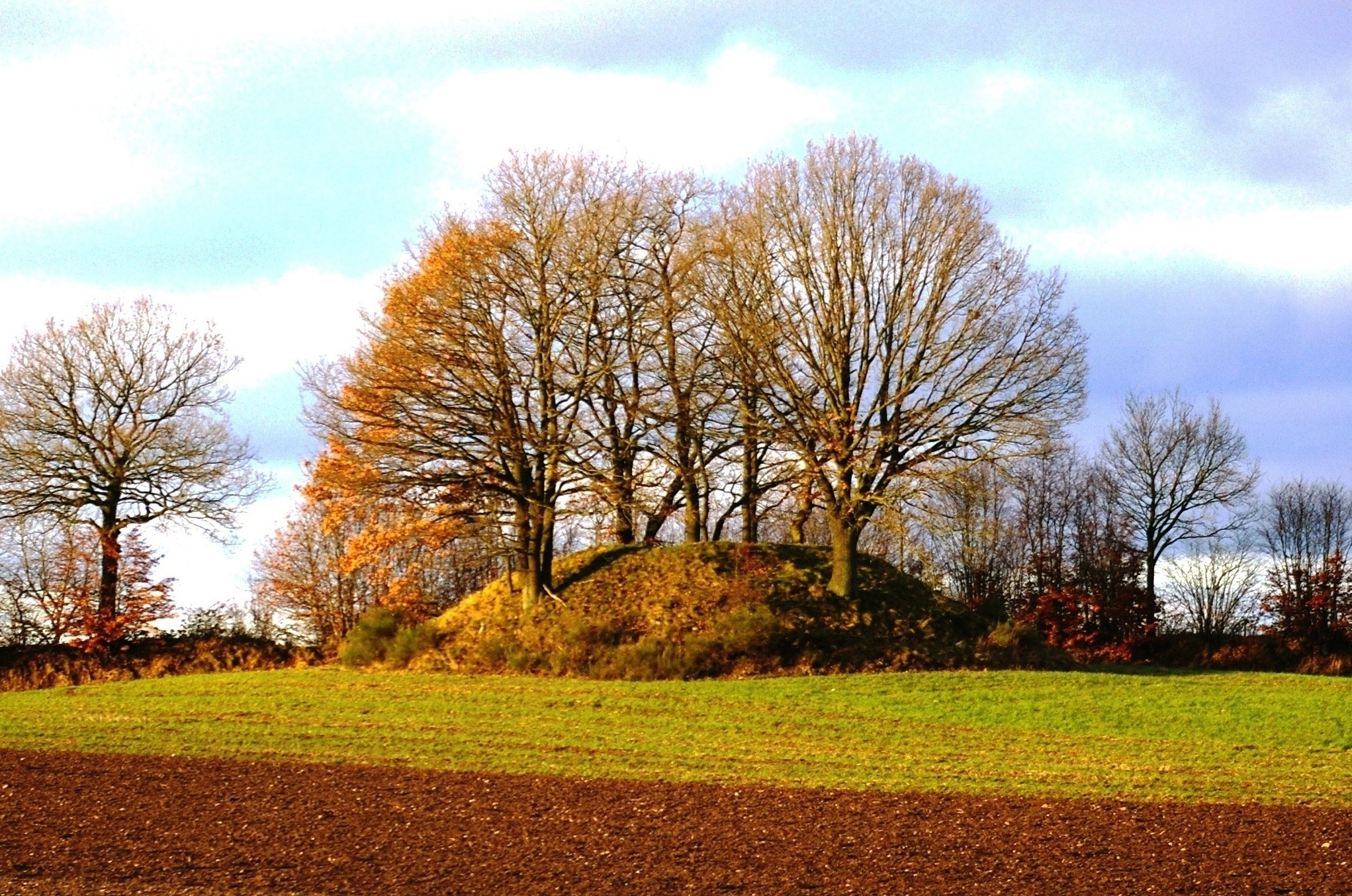 Baumbewachsener Grabhügel, an der Kreisstraße 36, zwischen Haustierpark "Arche Warder" und "Sandfeld" (Ortsteil von Langwedel).